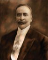 Foto de Eladio Victoria y Victoria, presidente dominicano.